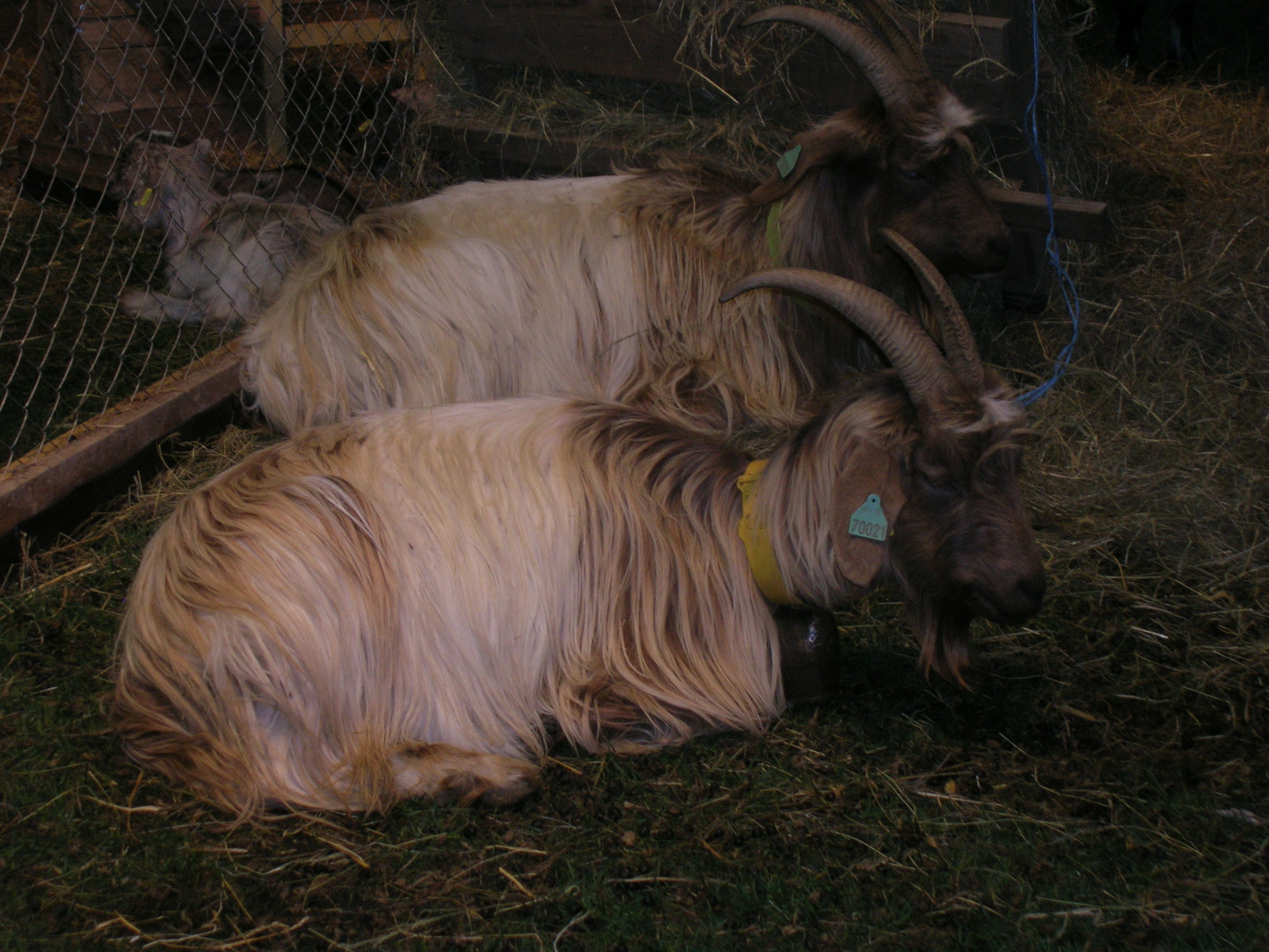 Chèvres pyrénéennes au salon SISQA de Toulouse. (salon agroalimentaire et agricole)